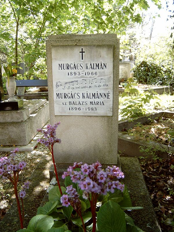 Murgács Kálmán (Sepsiszentgyörgy, 1893. szept. 20. – Bp., 1966. márc. 25.) nótaszerző sírja Budapesten. Új köztemető: 34/II-1-257.